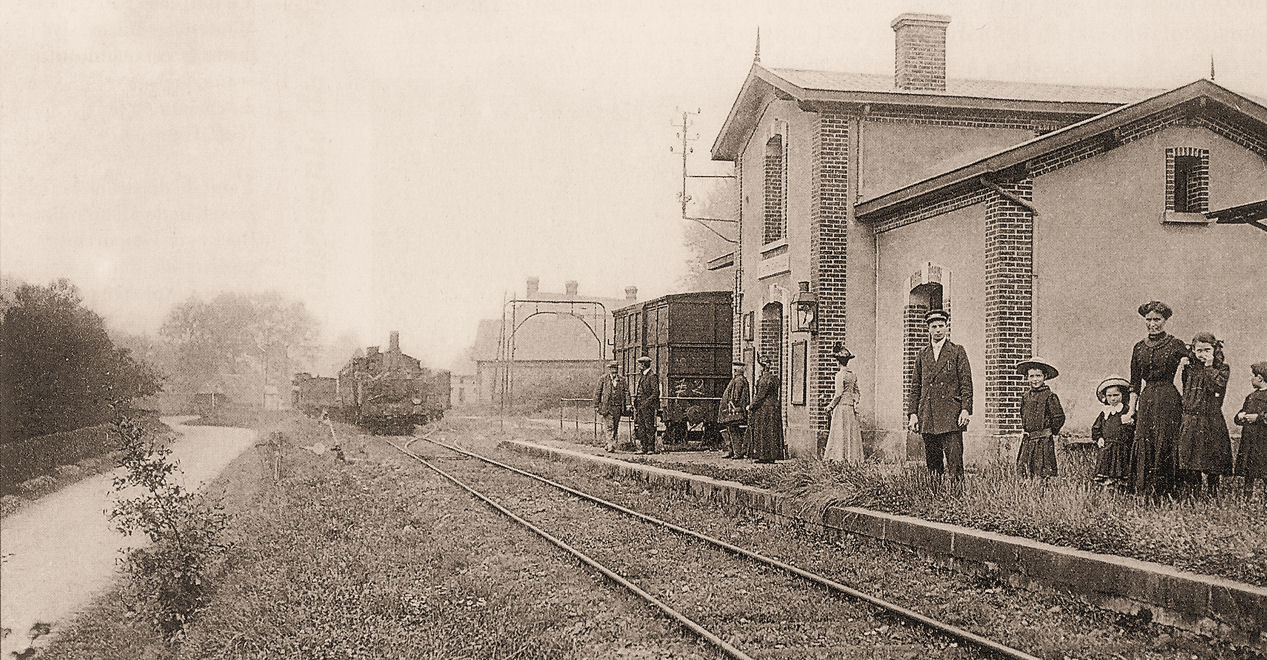 Ligne Montérolier-Buchy - Saint-Saëns - La gare intermédiaire de Saint-Martin-Osmonville